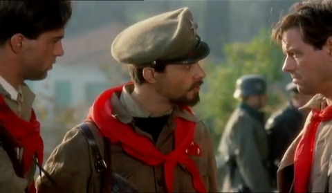 Filmkocka a Mussolini végnapjai című filmből